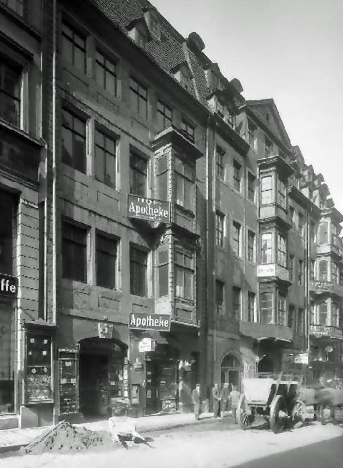 Die alte Adler-Apotheke in Leipzig 1907 vor ihrem Abriss